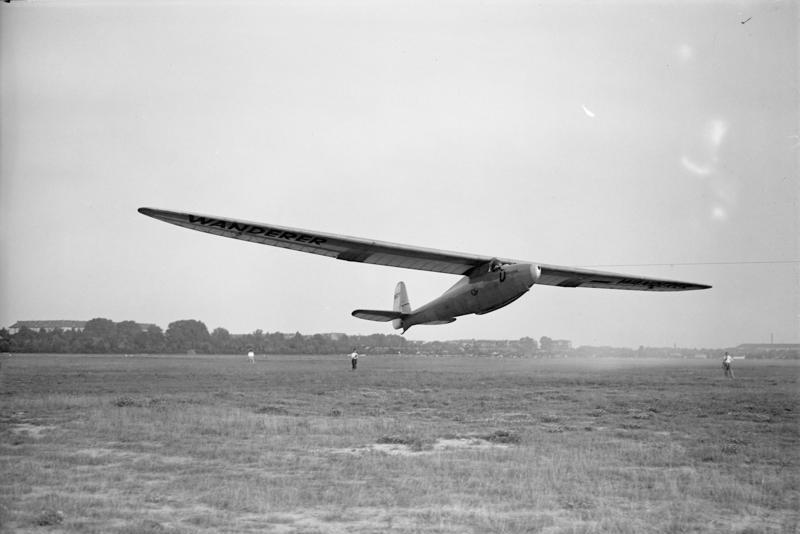 Der Deutsche Wolkenkratzer-Flieger Wolf Hirt, welcher erfolgreich über New York Segelflüge absolvierte, startete zu einem 2- Stundenflug über dem Häusermeer Berlins. Er landete wohlbehalten auf dem Centralflughafen in Berlin. Der Start Wolf Hirt's in seinem Segelflugzeug "Musterle" auf dem Centralflughafen in Berlin.